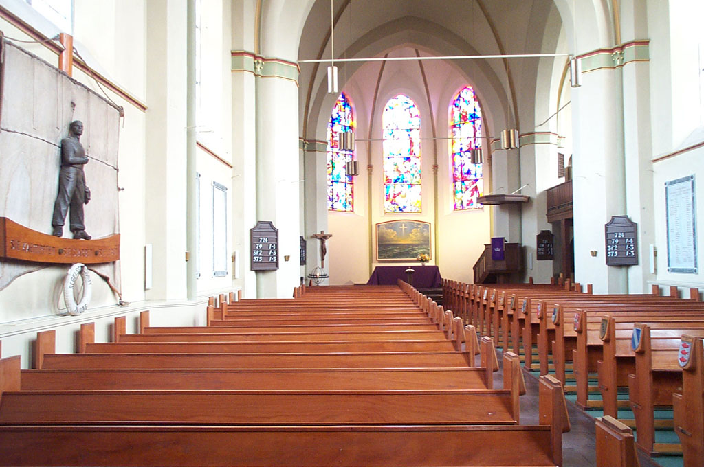 Christus- und Garnisonkirche in Wilhelmshaven, Altarraum